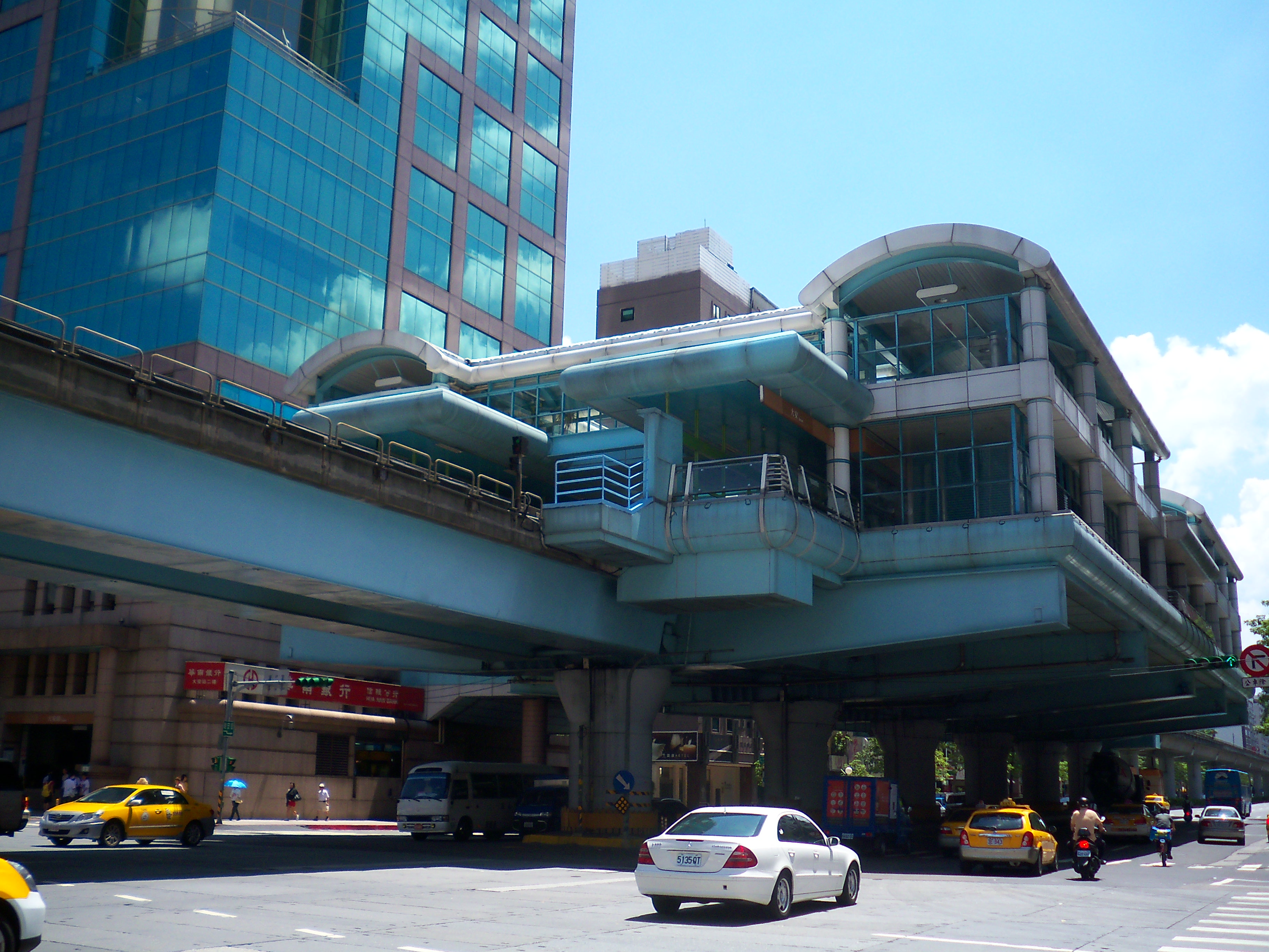 台北捷運文山線大安駅。